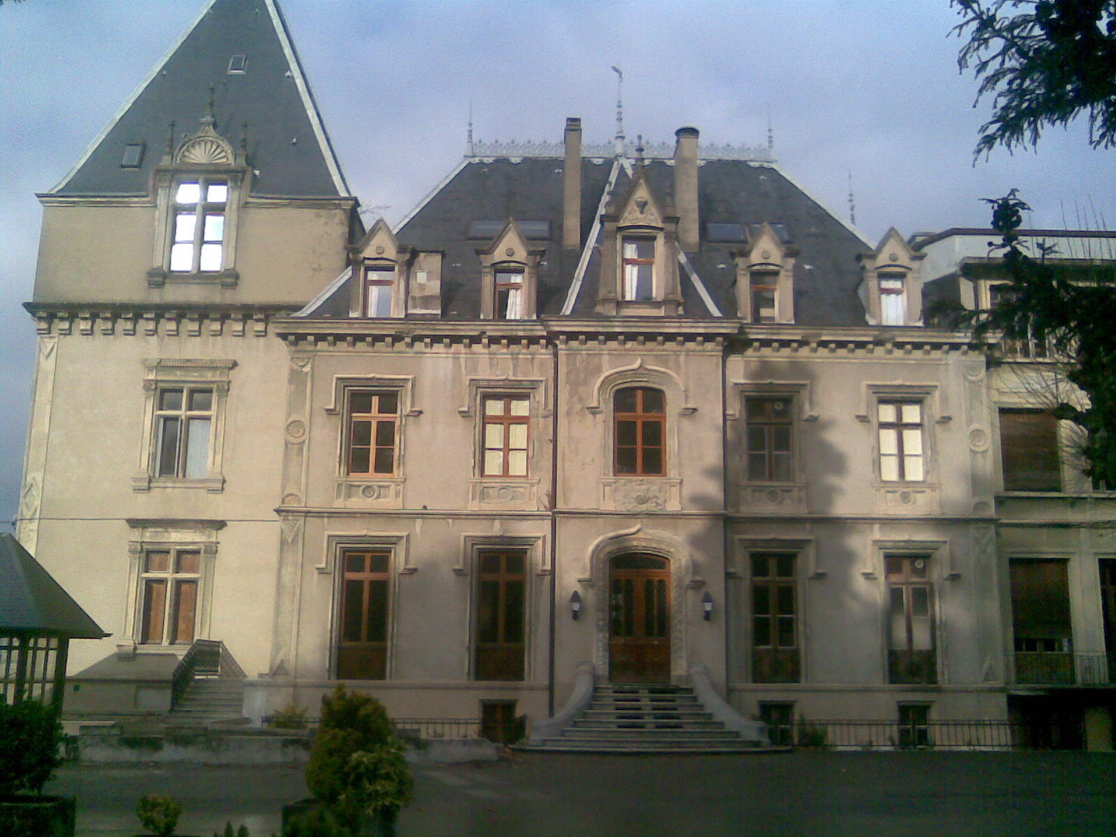 Le chateau de Blonay à Publier.